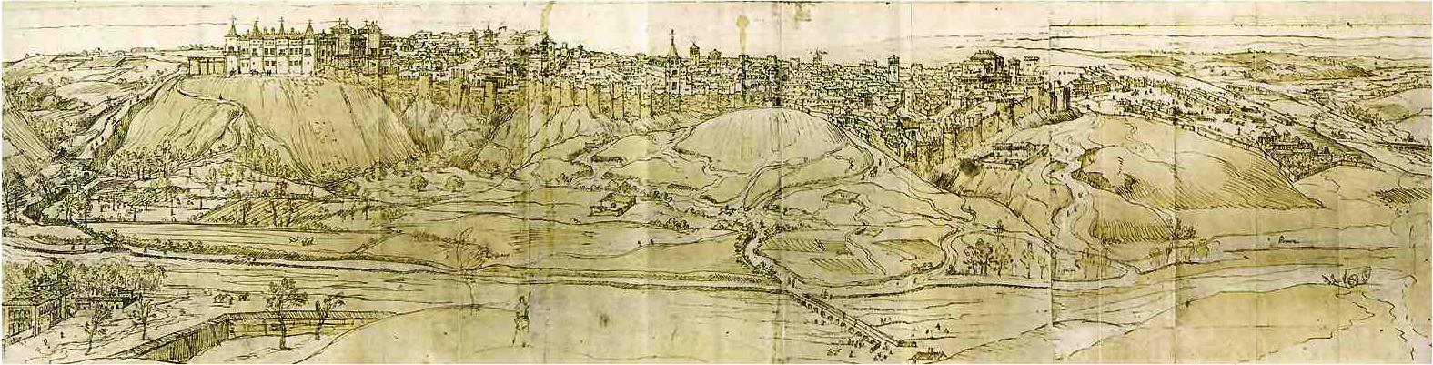 Vista de Madrid. Dibujo preparatorio realizado a pluma con tinta sepia sobre lápiz negro en papel. Se conserva en la National-bibliothek de Viena (Ms. Min. 4178). Dimensiones: 365 x 1252 mm.